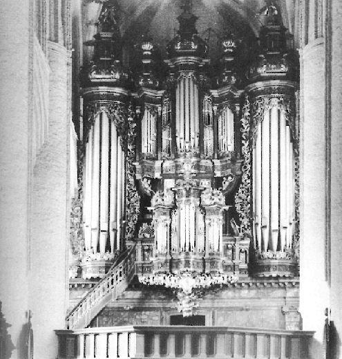 Orgel in St. Katharinen, Hamburg, Deutschland